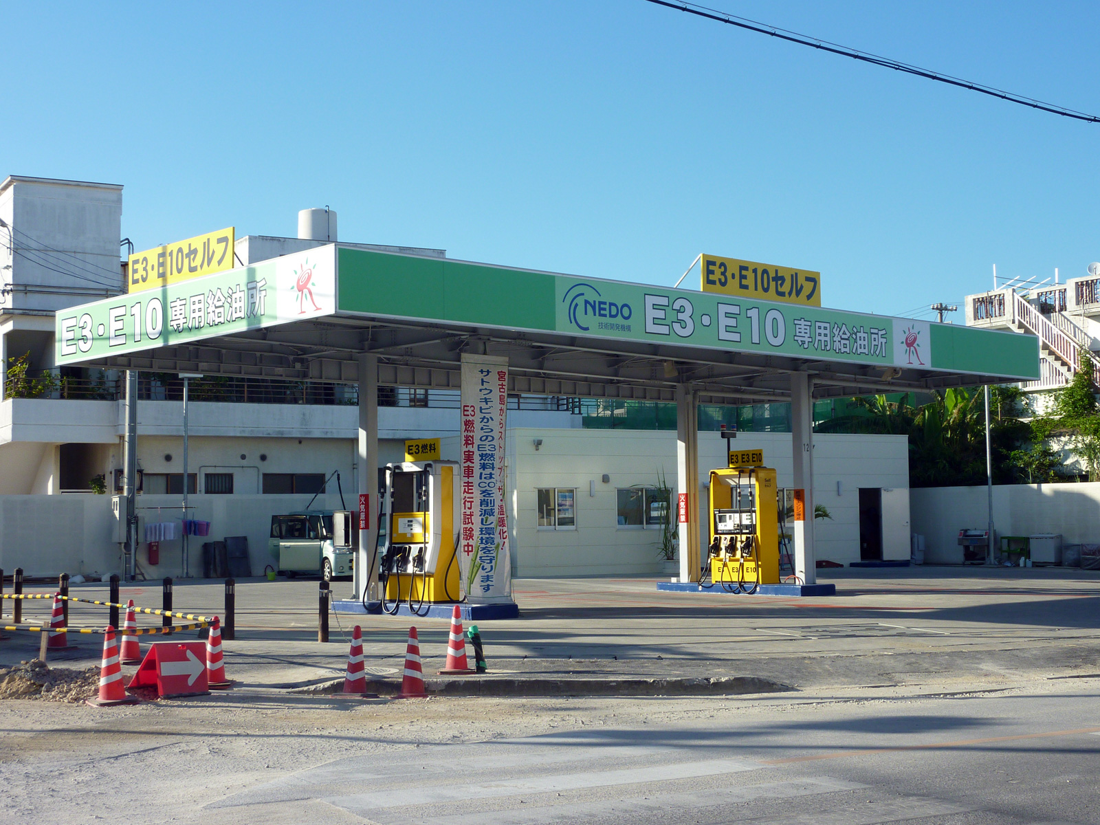 E3/E10専用ガソリンスタンド（沖縄県宮古島市）